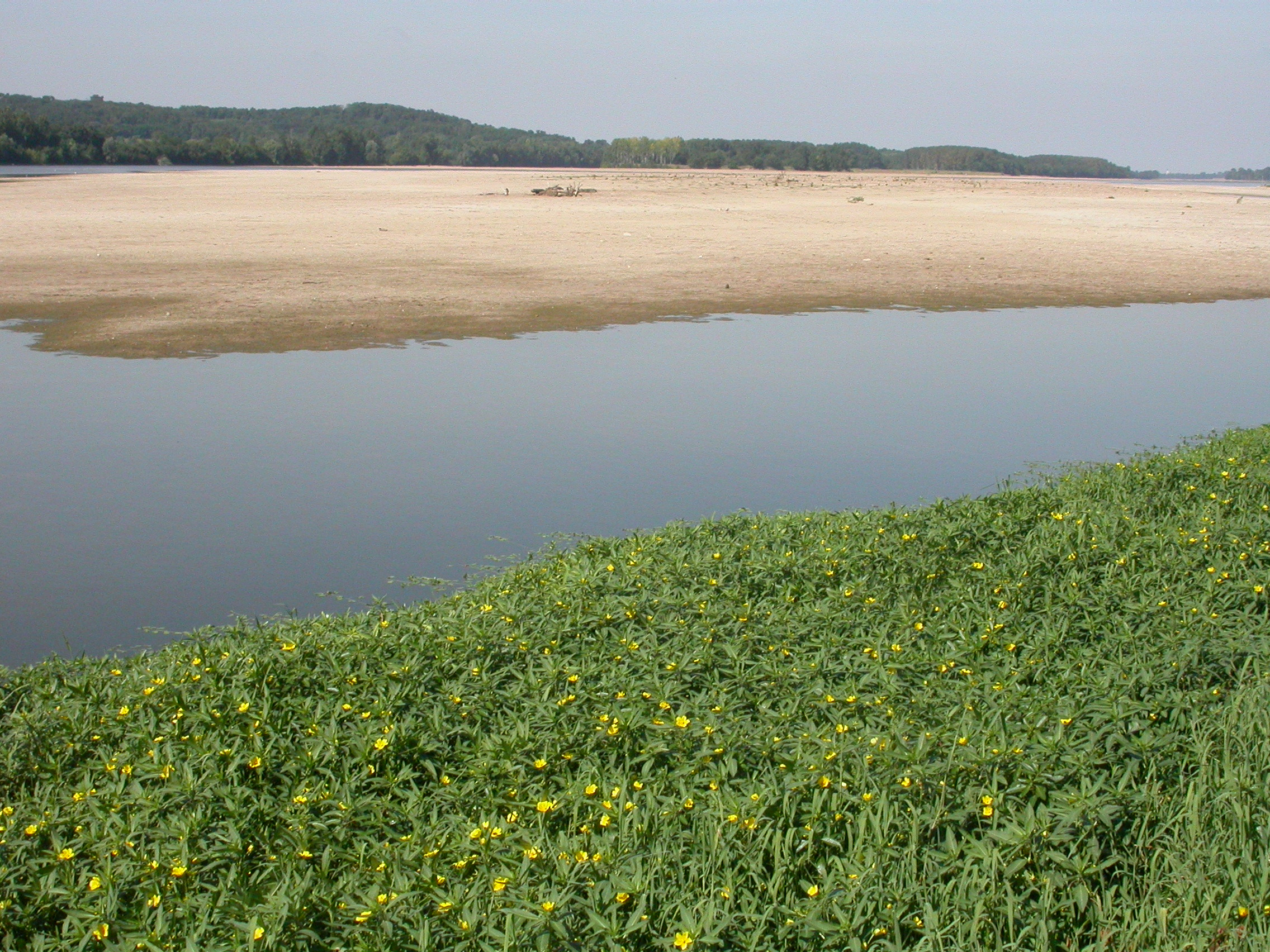 Ludwigia grandiflora subsp. hexapetala Saint-Mathurin-sur-Loire (Maine-et-Loire), France